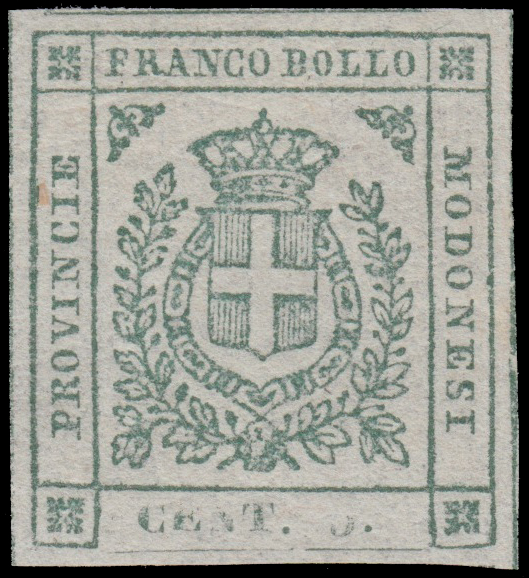 Первая марка Временного правительства Модены